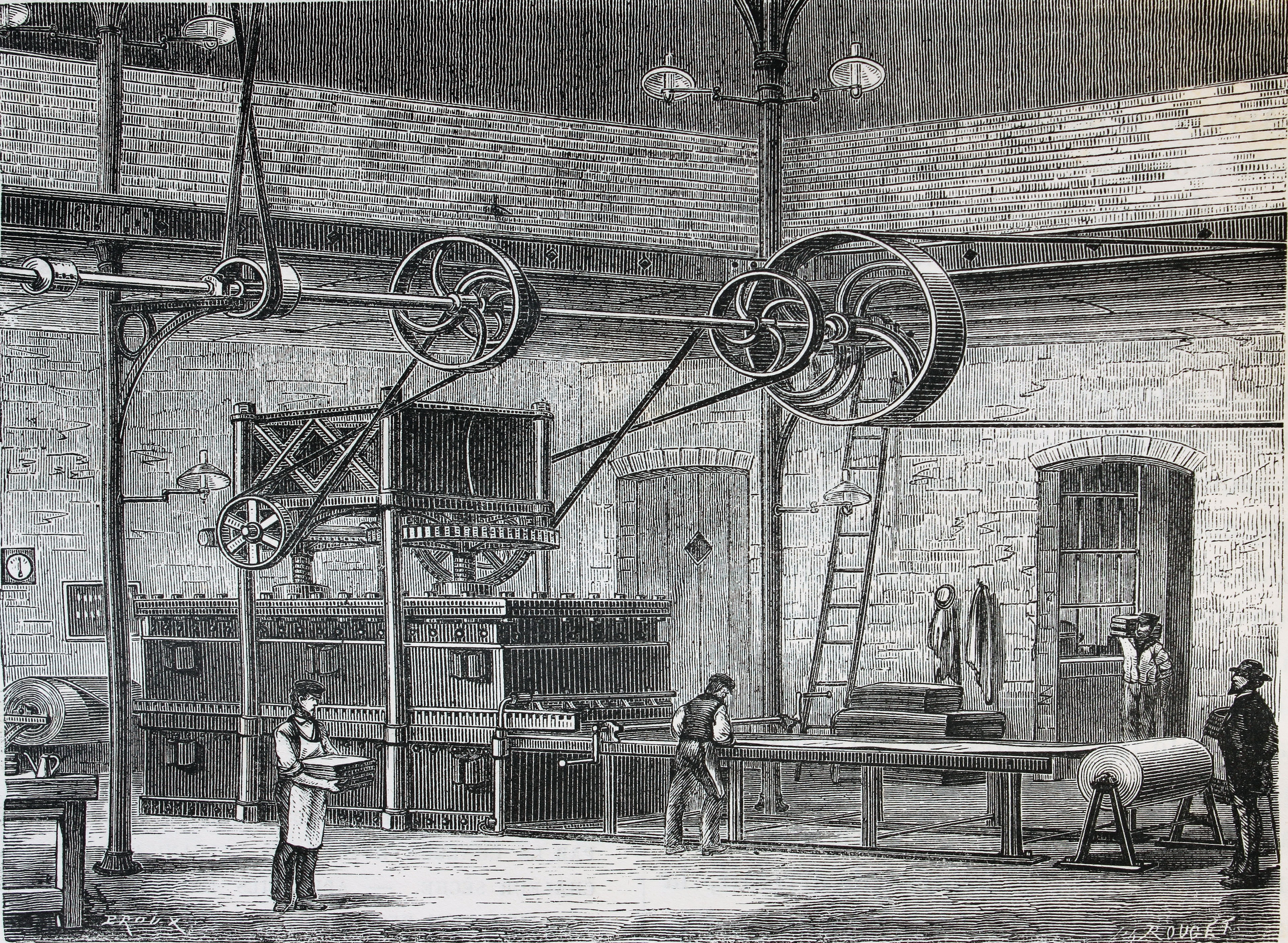 Ilustraciones de la obra : Les merveilles de l'industrie ou, Description des principales industries modernes / par Louis Figuier. - Paris : Furne, Jouvet, [1873-1877]. - Tome II